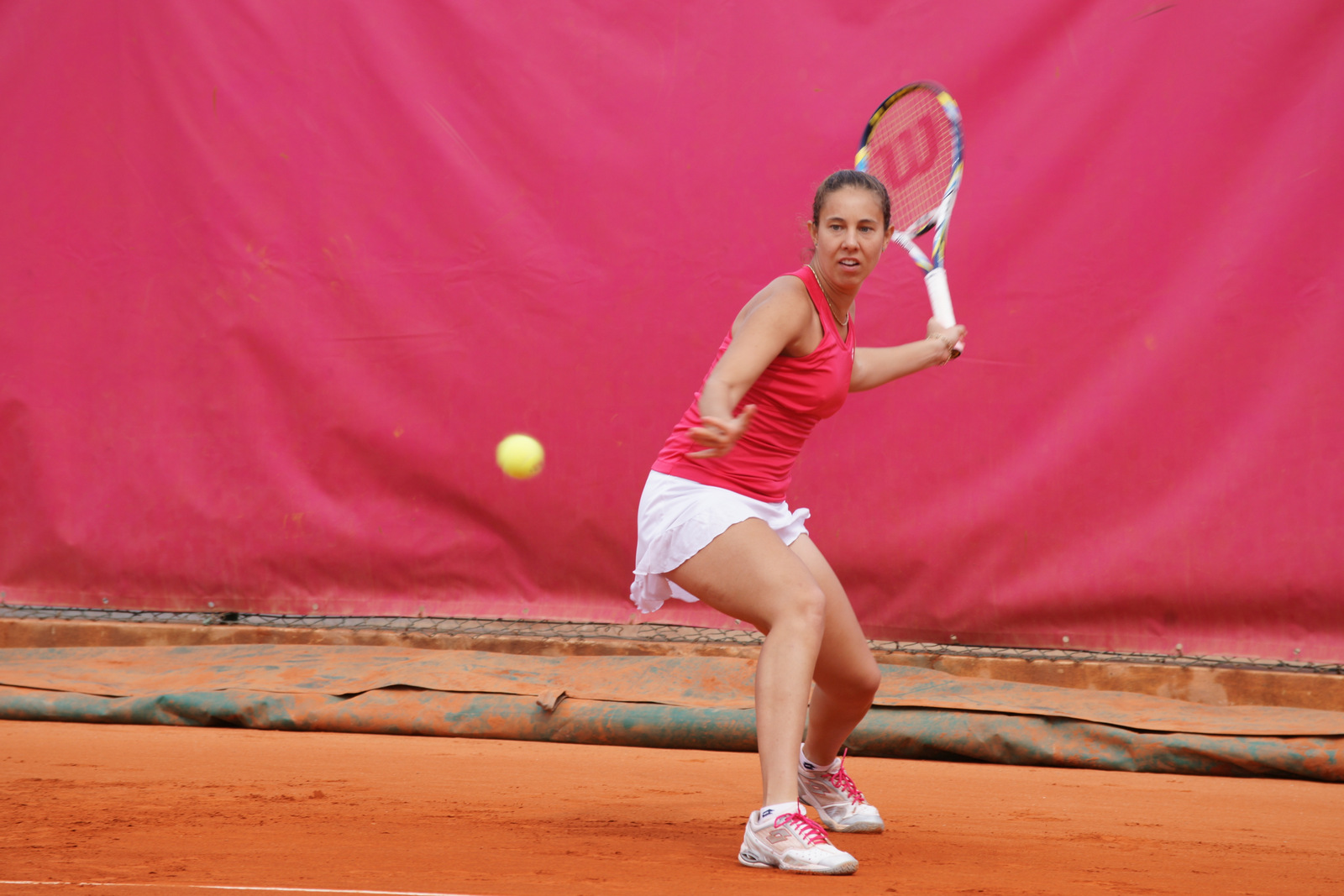 Mihaela BUZARNESCU, Open Cagnes 2012